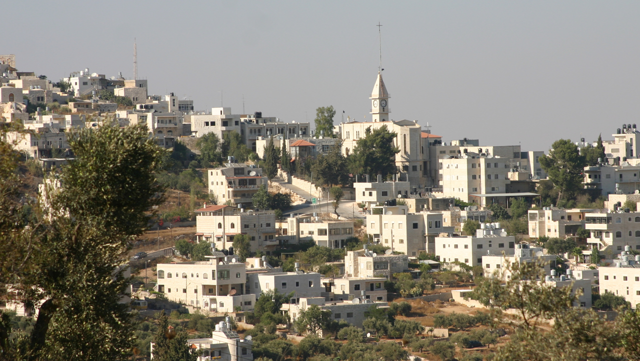 Taybeh, Palästina.